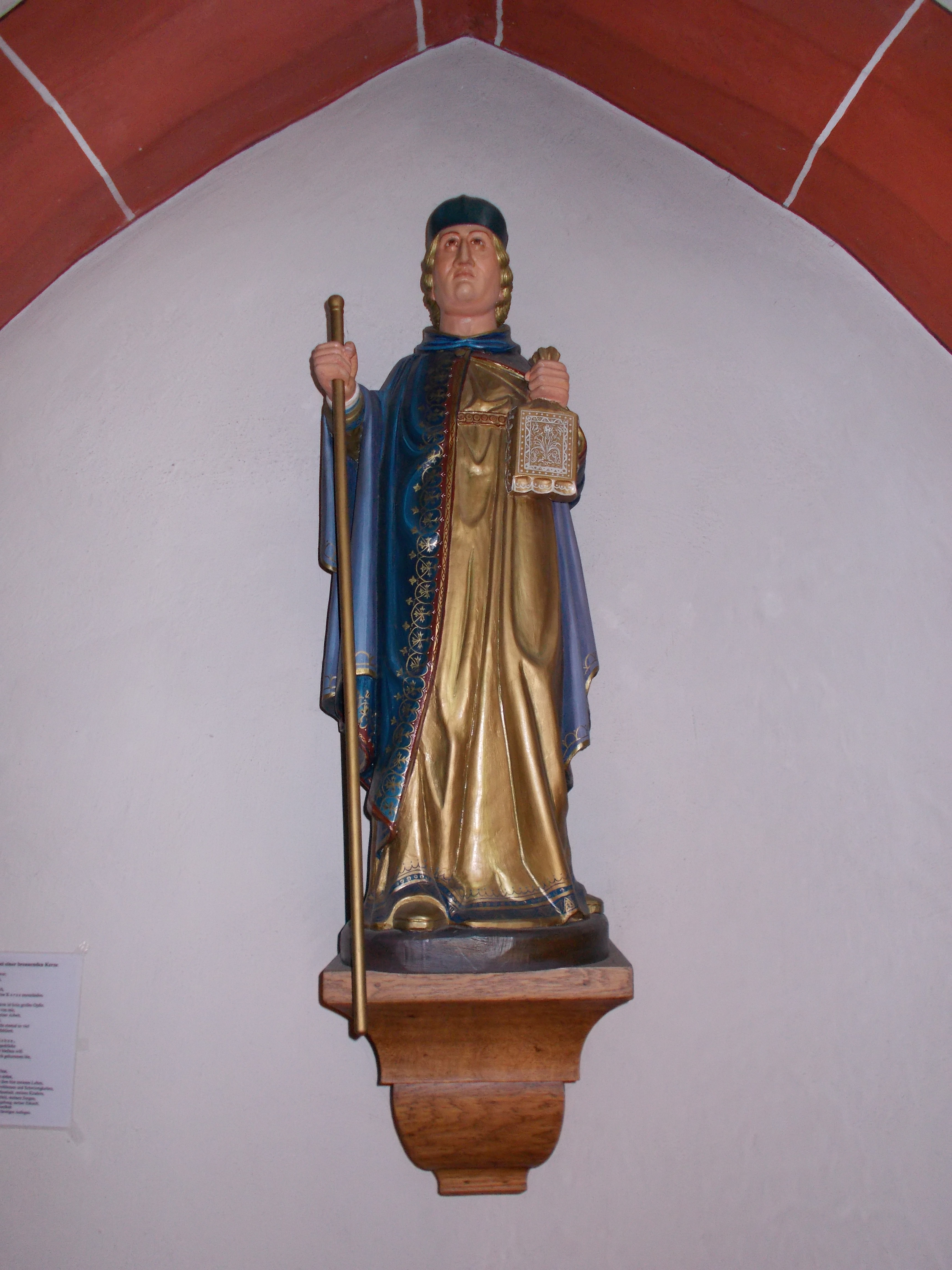 Statue des Heiligen Gerebernus in der Wallfahrtskapelle. Die Figur von 2005 ist eine Nachbildung des Heiligen aus dem 15. Jahrhundert.